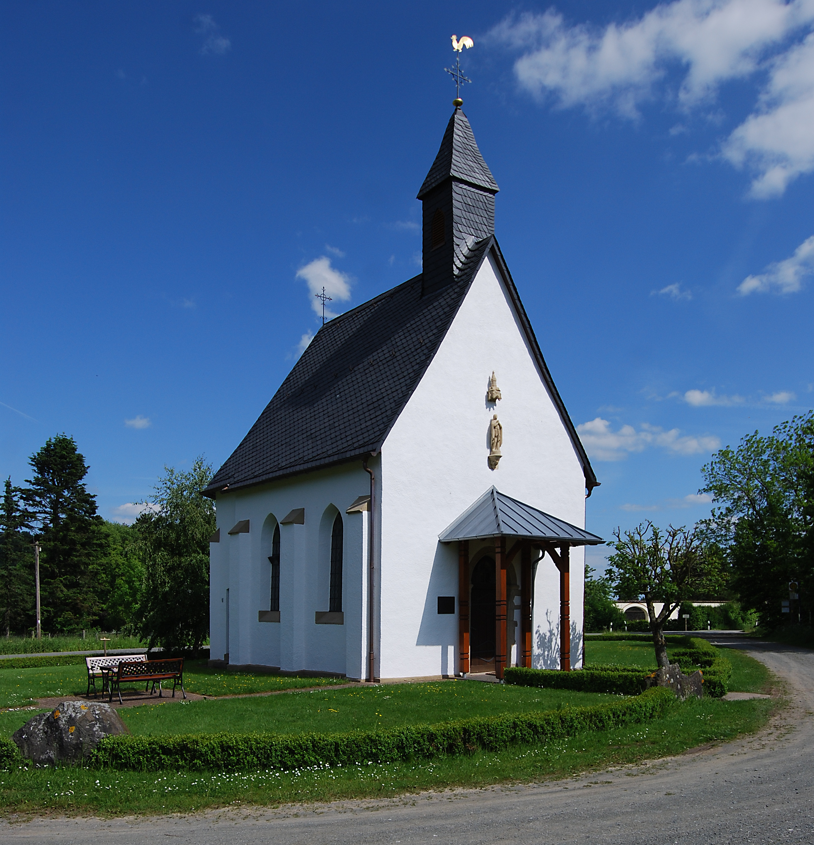 Kapelle St. Laurentius in Glindfeld (Glindfeld 19) im Ortsteil Medelon der Stadt Medebach im Hochsauerlandkreis in Nordrhein-Westfalen This is a photograph of an architectural monument.